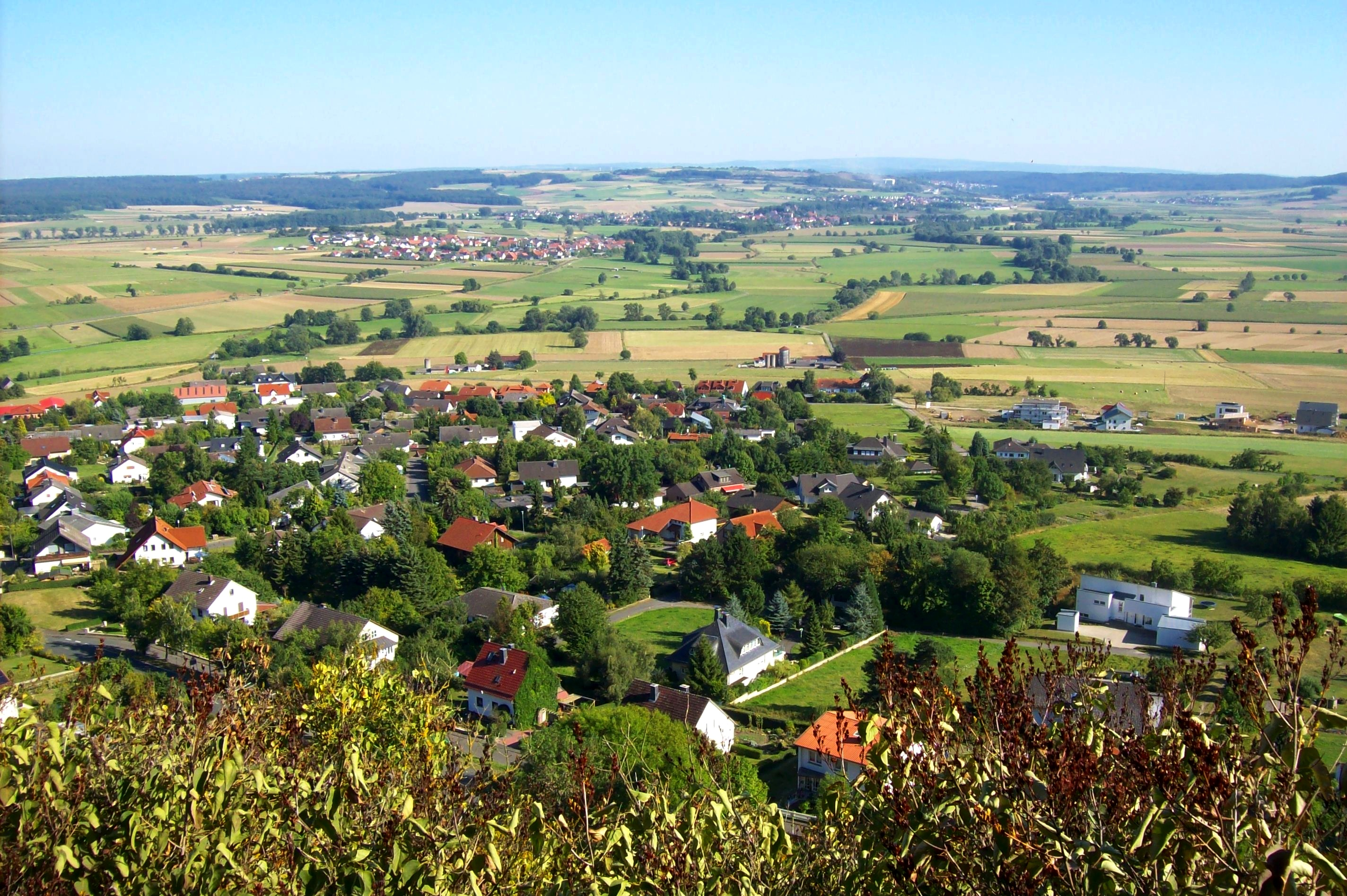 Ausblick vom Café an der Amöneburg nach Osten auf das obere Ohmtal